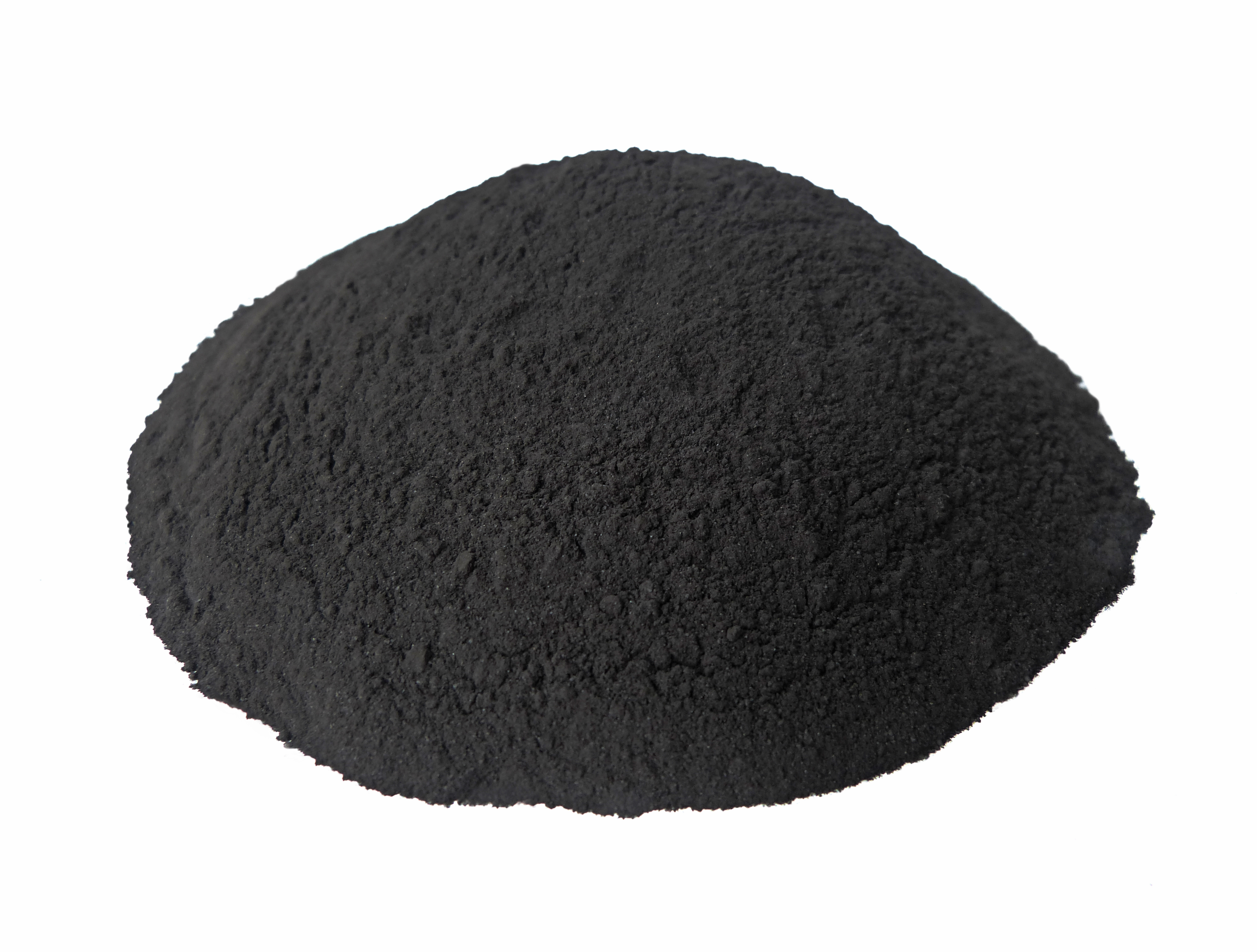 Леонардит, лигнит, высший сорт, в сухом состоянии